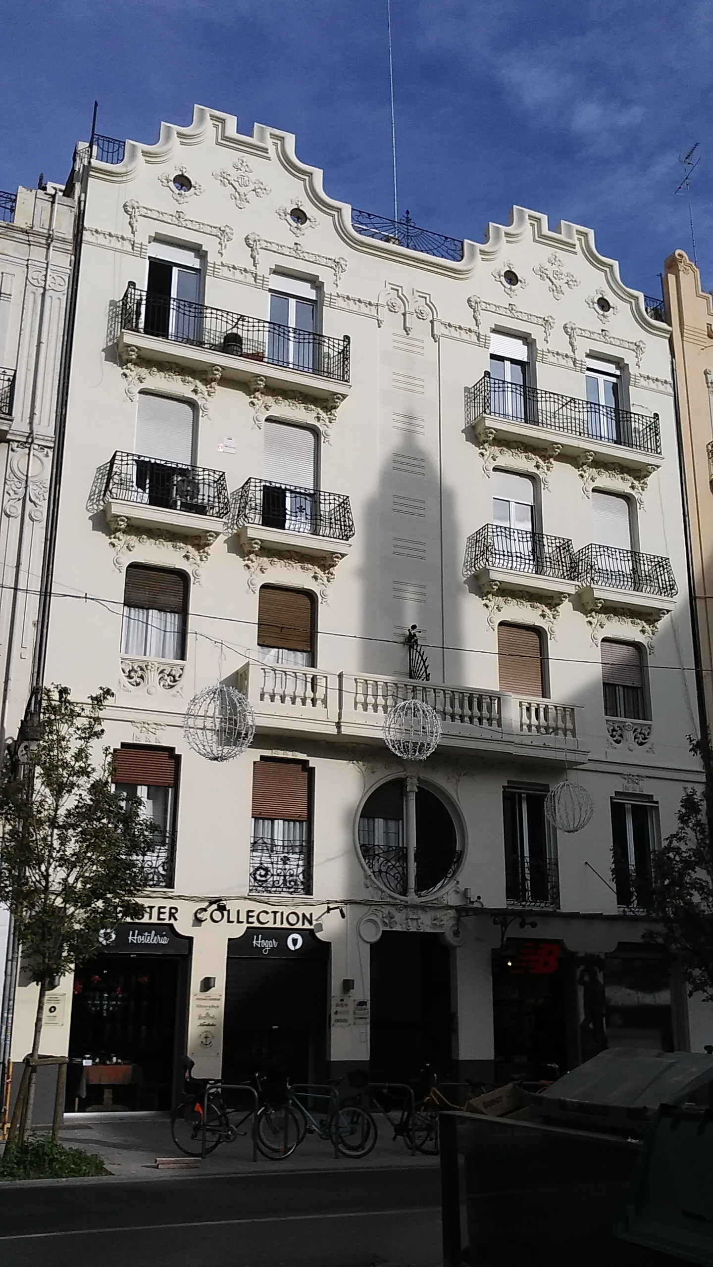 Casa de Manuel Peris en el carrer Comte de Salvatierra número 25, en Valéncia, (1911). Obra de l'arquitecte valencià Manuel Peris Ferrando.